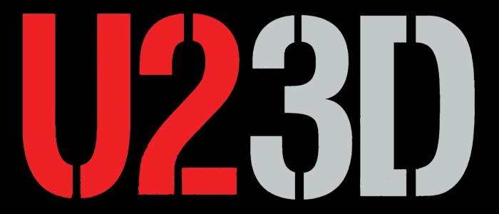 U2 3D film logo